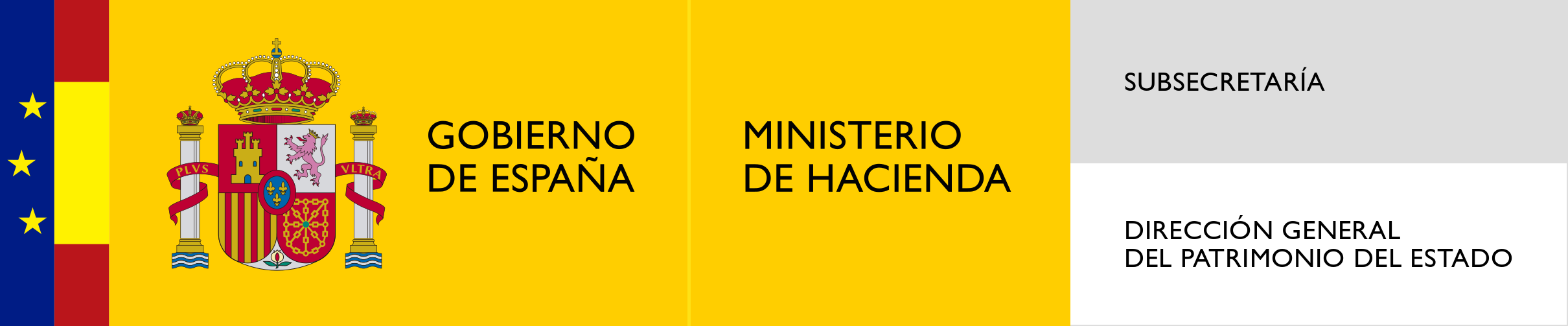 Logotipo de la Dirección General del Patrimonio del Estado de España